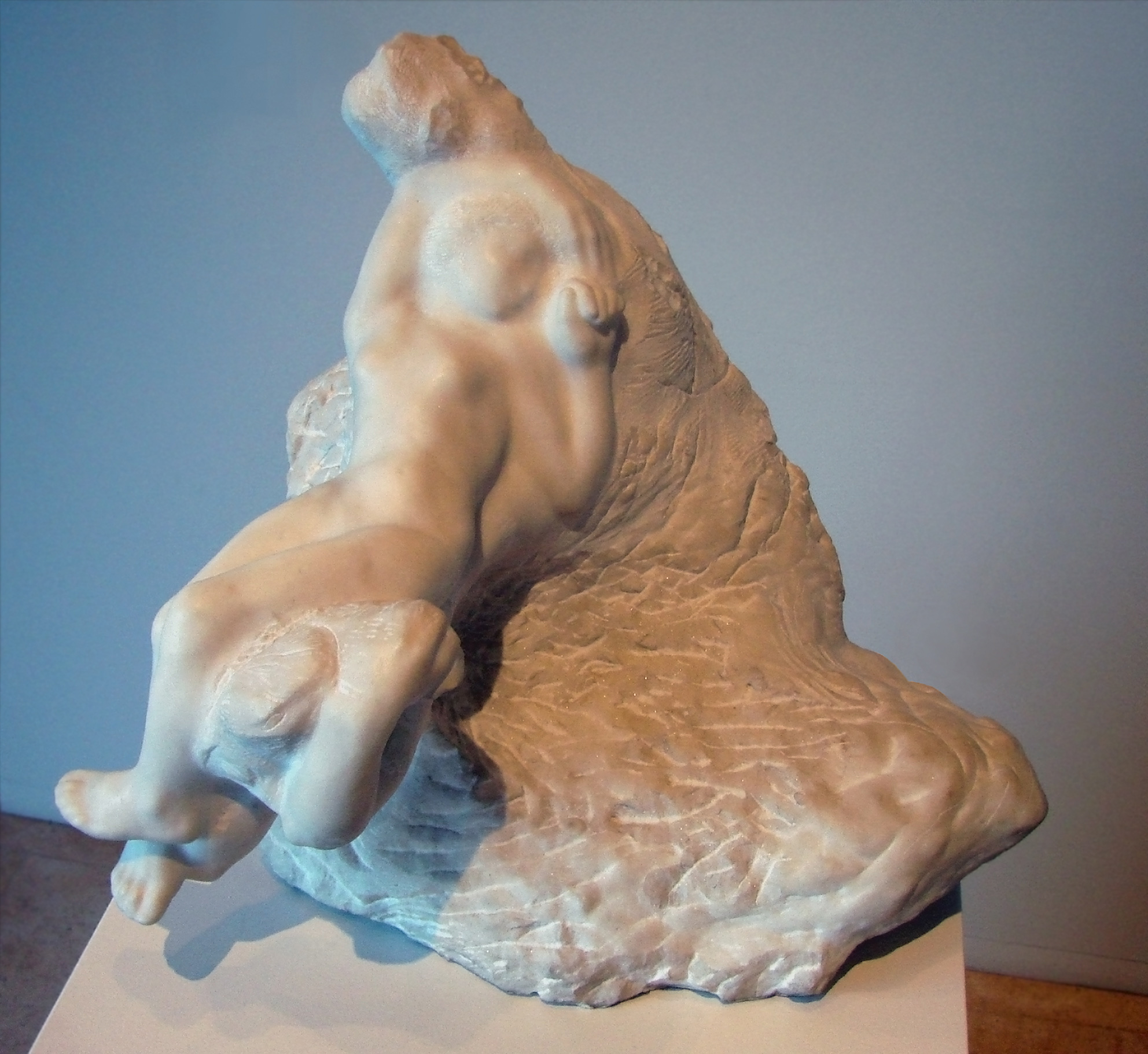 L'Amour et Psyché (vers 1907), par Auguste Rodin (1840-1917). Musée des Beaux-Arts de Nancy.